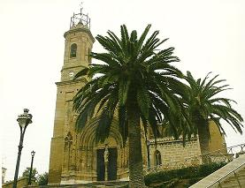 Antigua mezquita transformada en templo románico durante el siglo XIII. parte de lo que fue la acrópolis construida por la orden militar de San Juan.